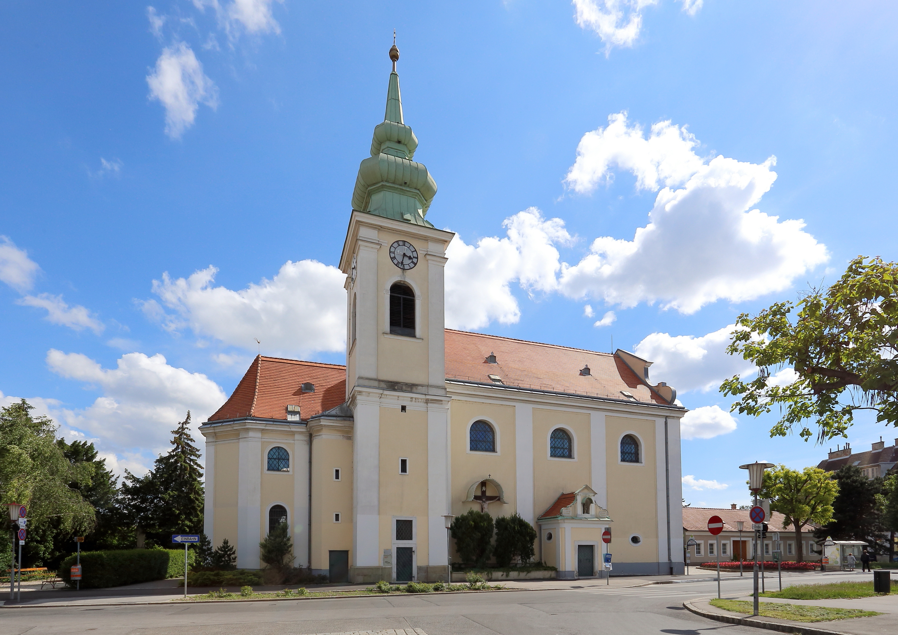 Katholische Pfarrkirche hl. Maria im Elend in Leopoldau, ein Ortsteil der österreichischen Hauptstadt Wien. Eine barocke Saalkirche mit teilweise gotischer Bausubstanz sowie einem halbeingestellten Nordturm.